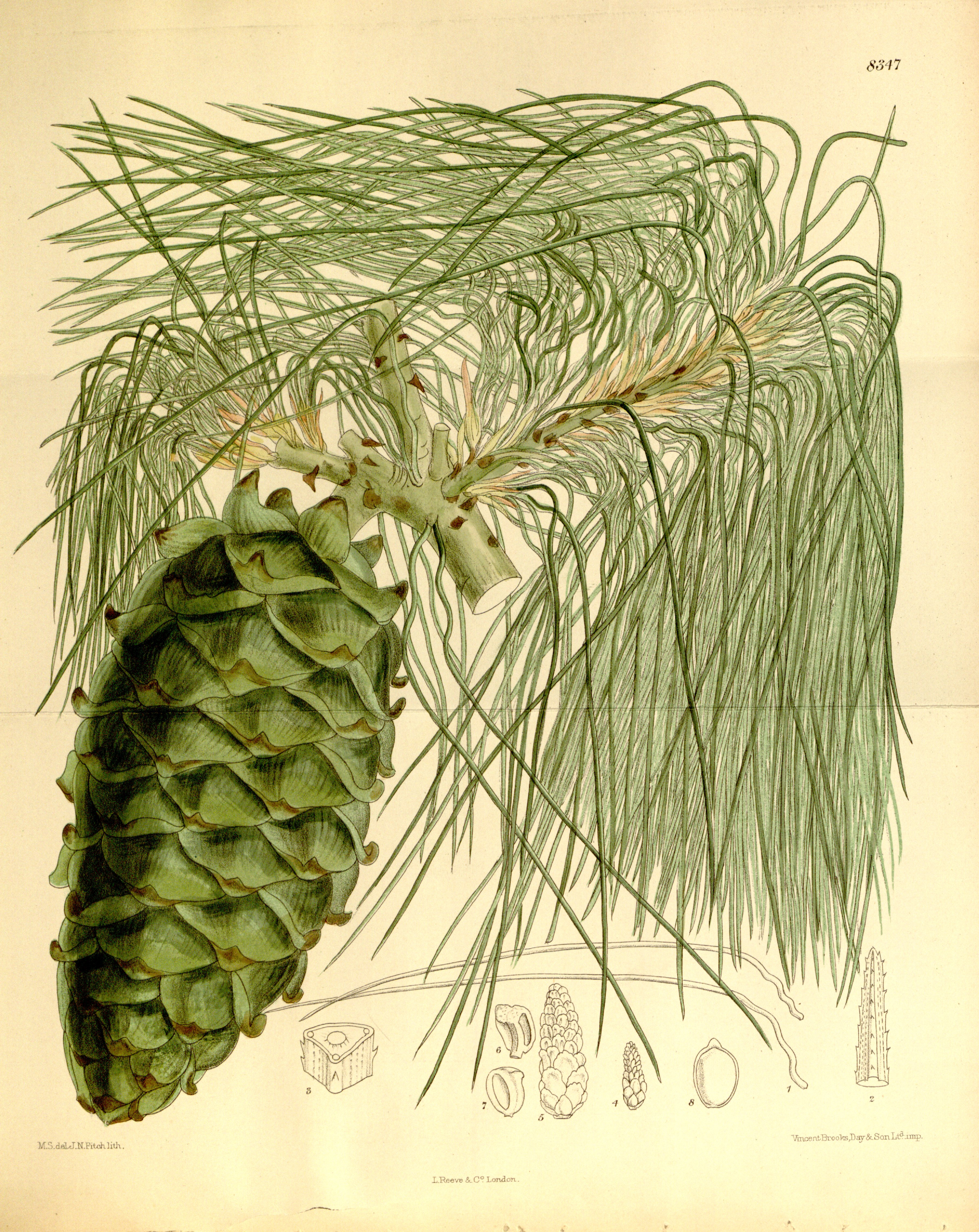 Pinus armandii, Pinaceae